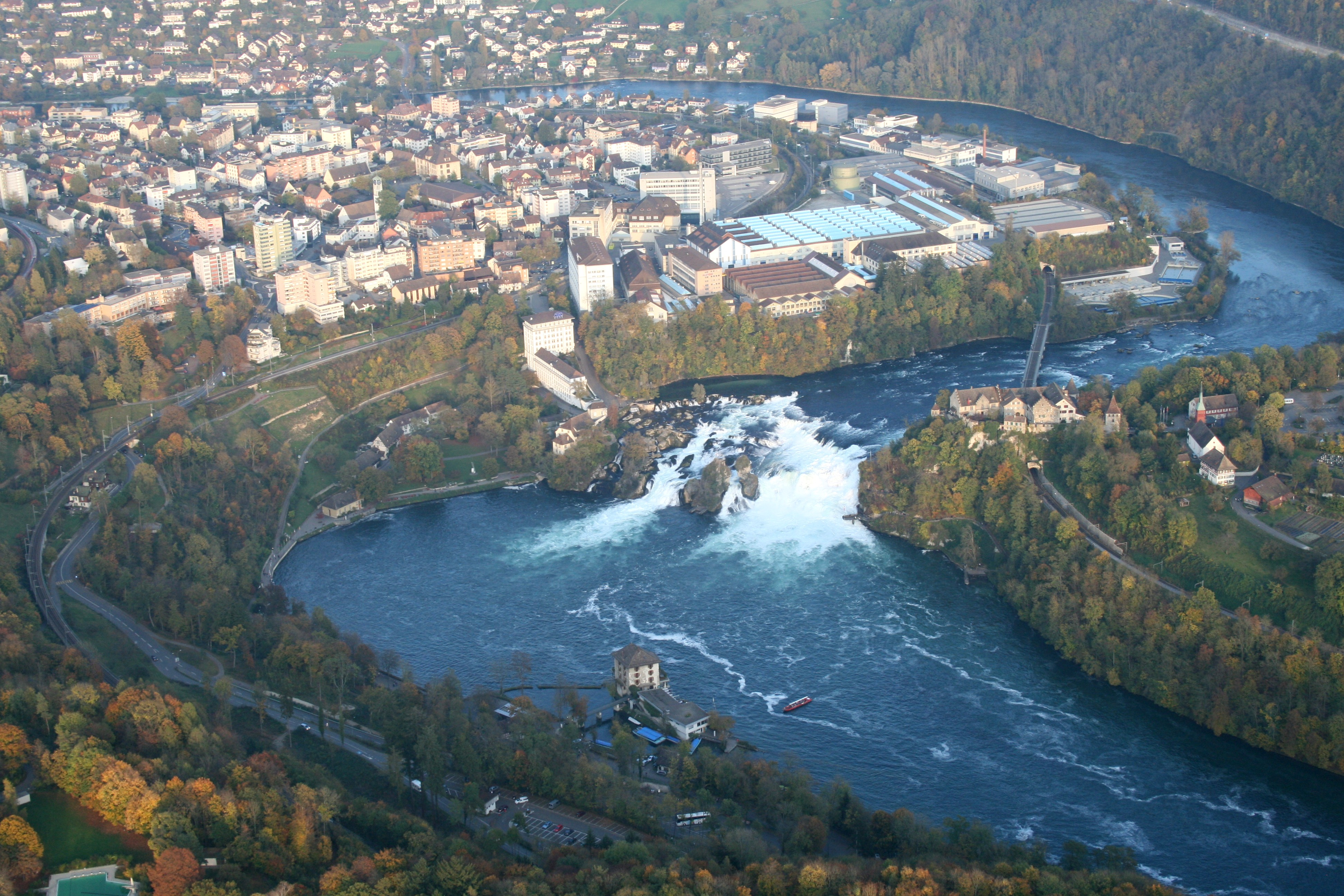 Rheinfall Schaffhausen aus der Vogelperspektive